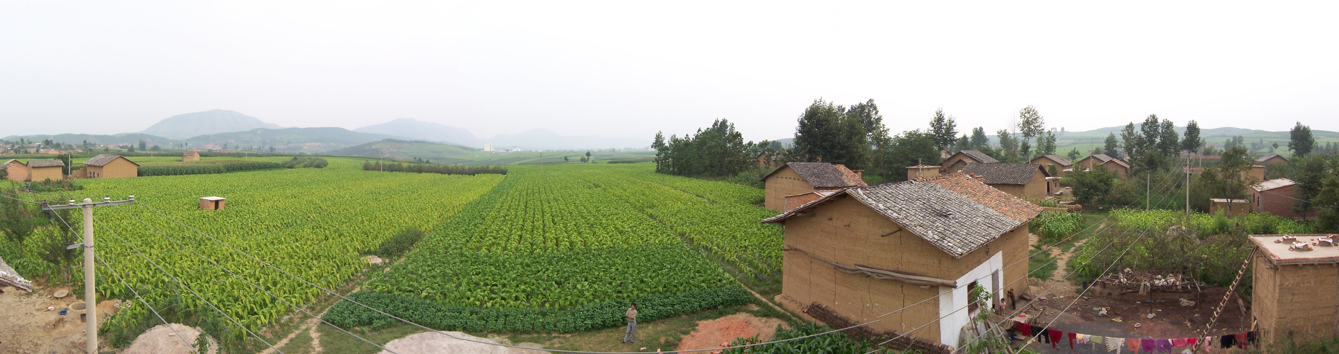 布嘎乡花鹿坪村